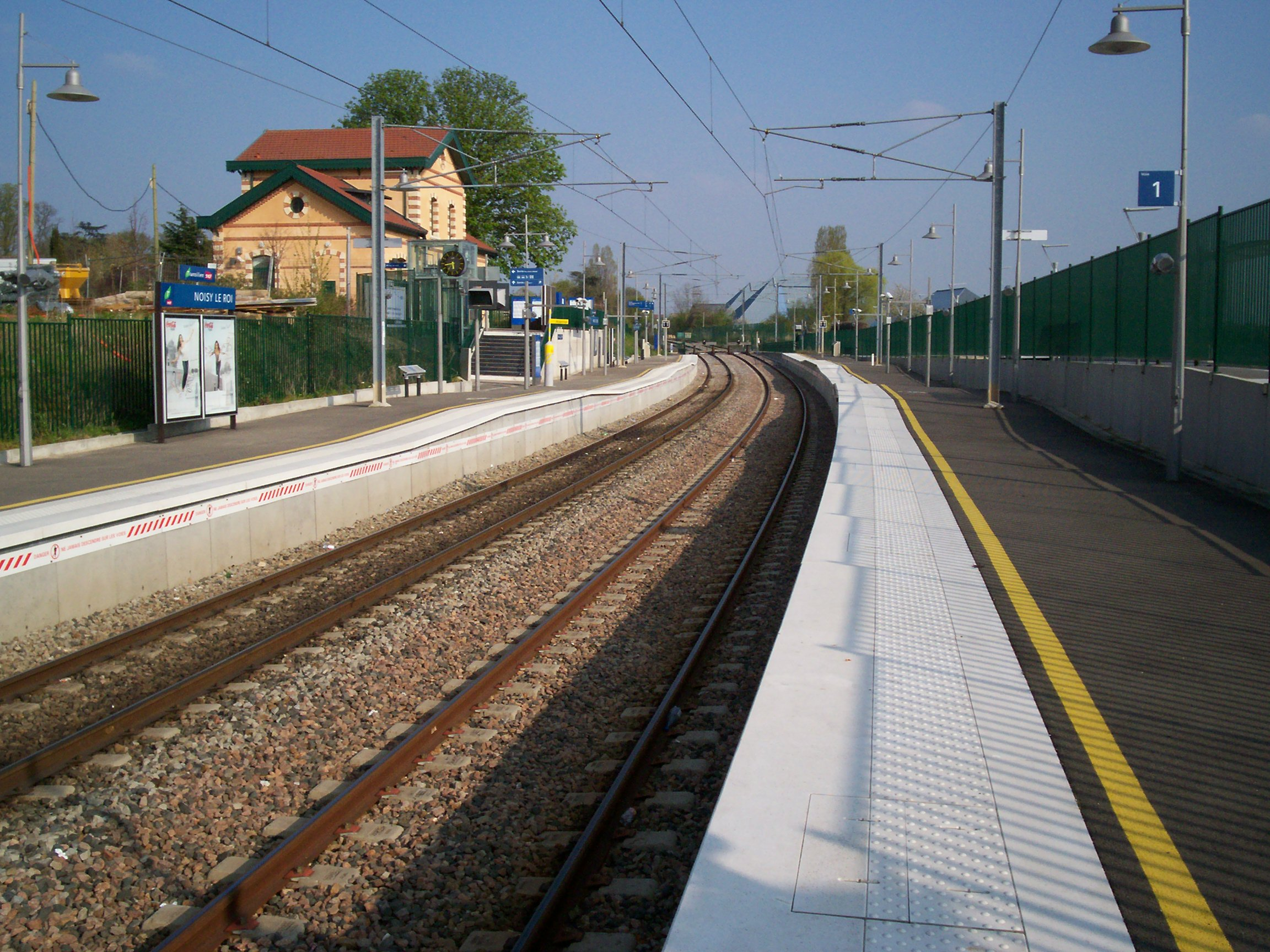 Gare de Noisy-le-Roi